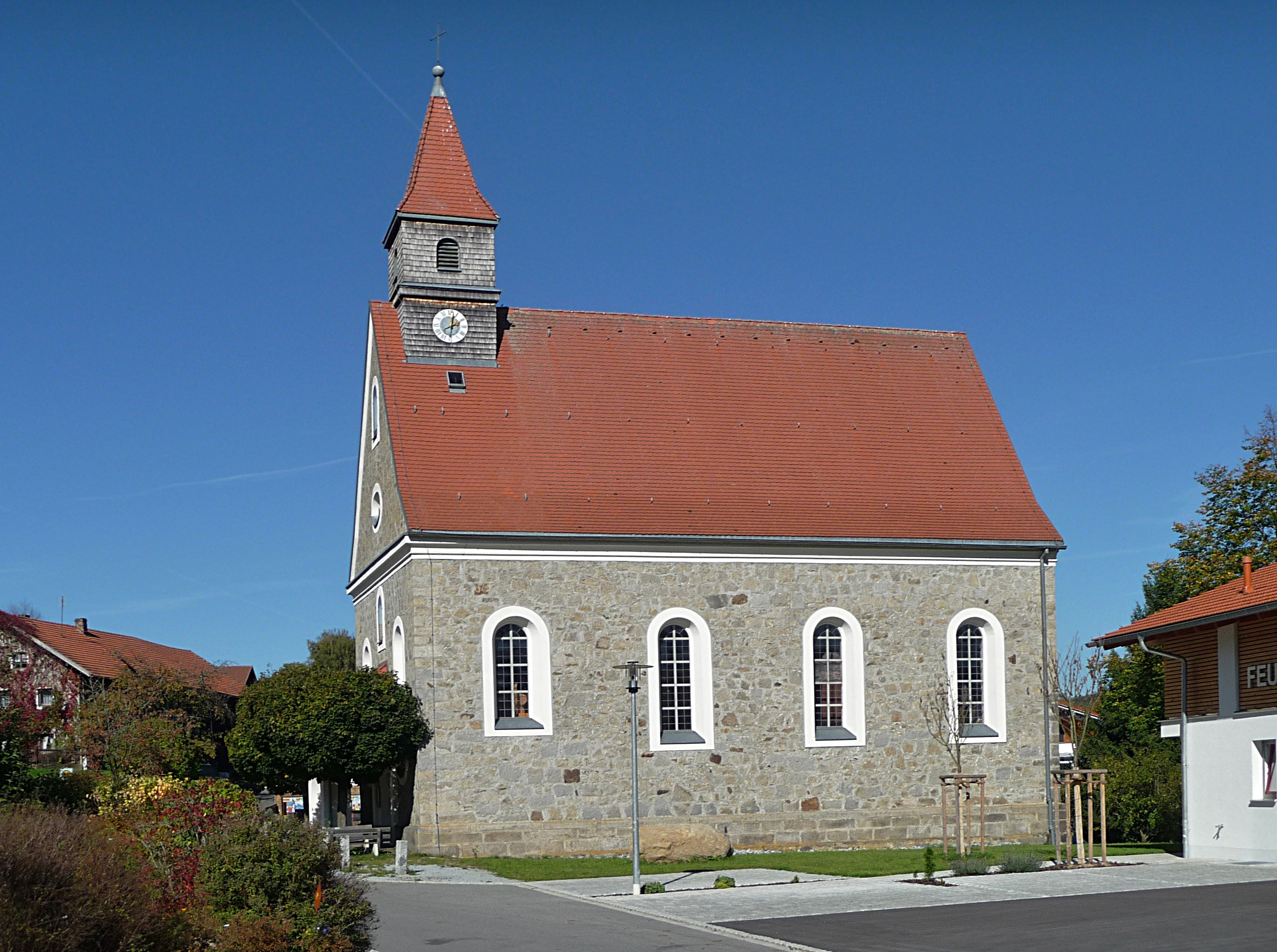 Die Filialkirche Mater Dolorosa in Allersdorf